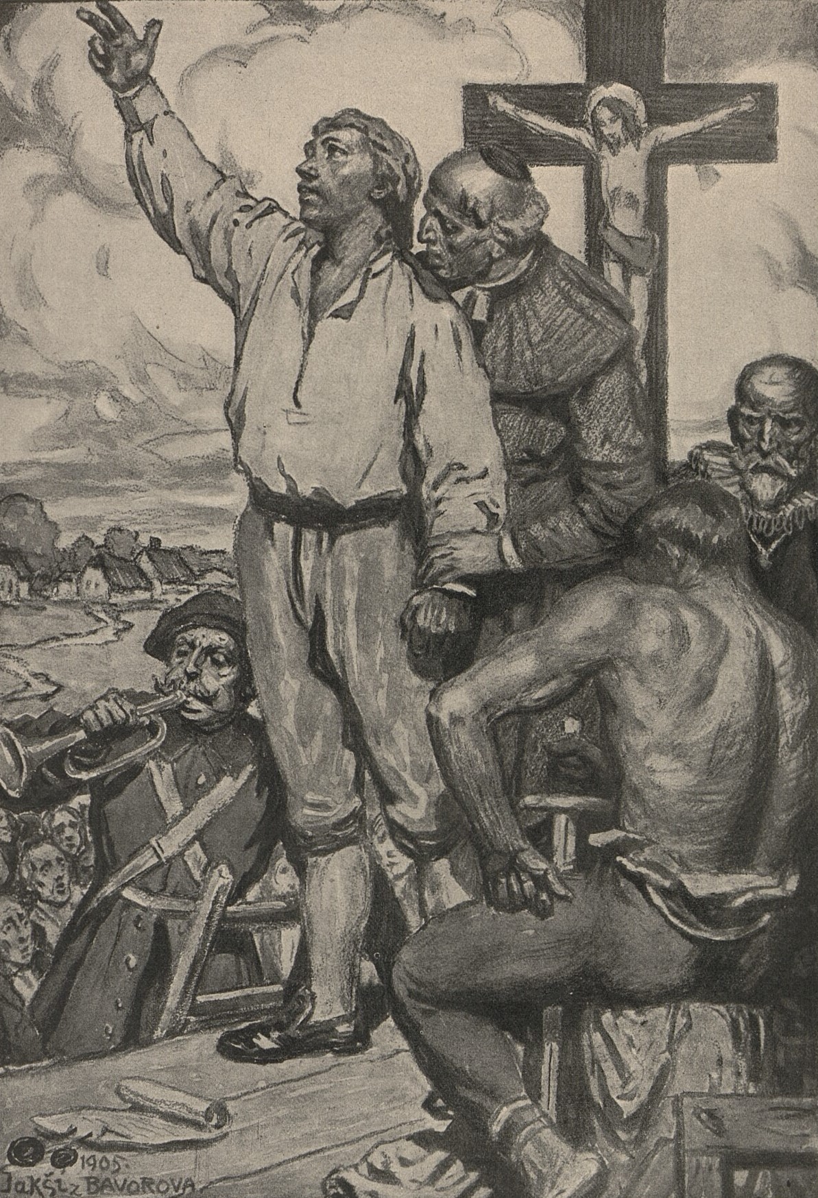 Josef Jakší (1874-1908): Poprava rychtáře Kubaty (repro Světozor 1906)